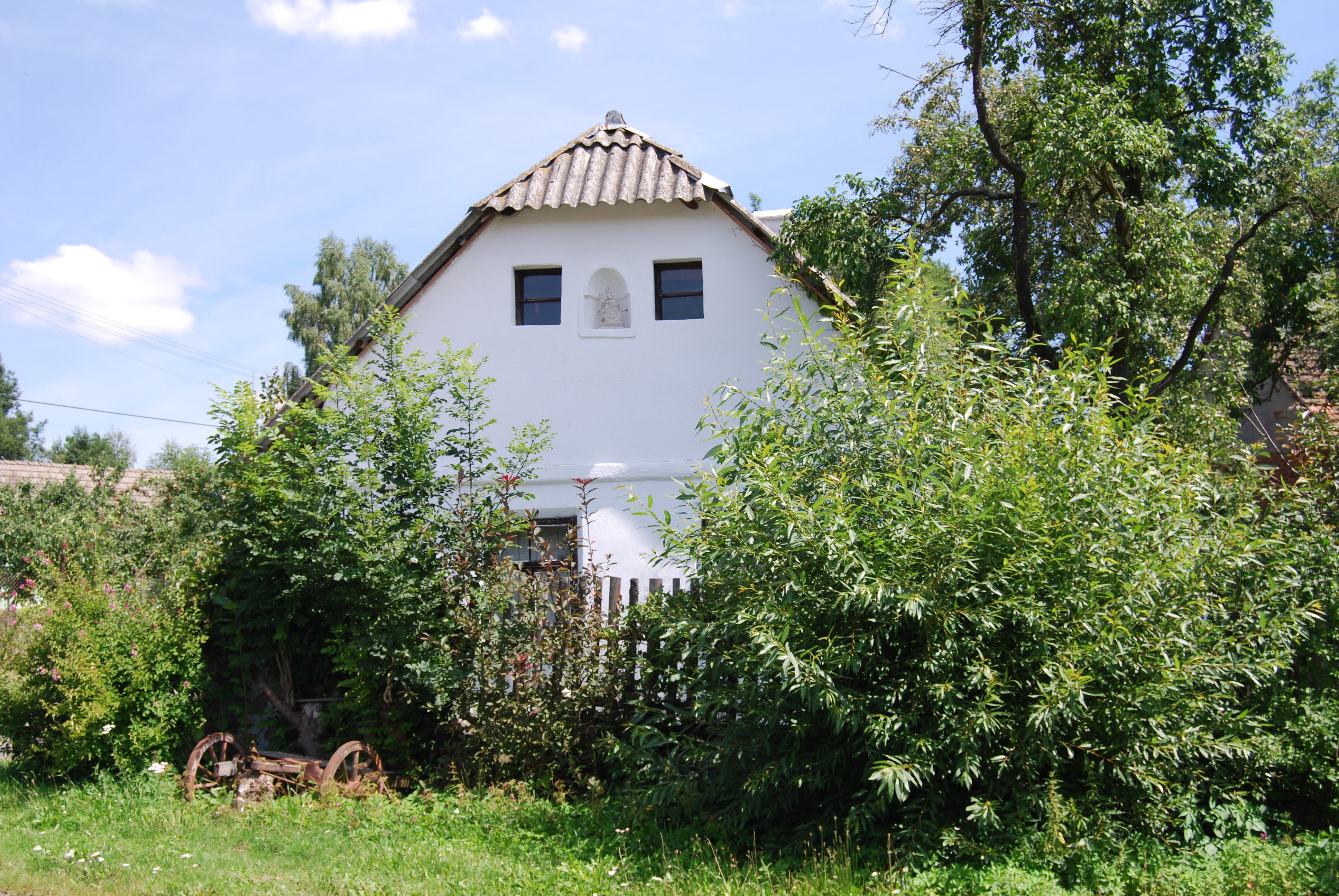 Stavení v obci. Žemličkova Lhota je část obce Petrovice v okrese Příbram. Česká republika.